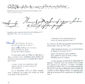 Première mention écrite de la tradition de l'arbre de Noêl, qui figure dans un livre de comptes de la Ville de Sélestat. Il est question d'une dépense de 4 Schillings pour payer des gardes-forestiers chargés de surveiller les arbres dans les forêts municipales...et d'une amende infligée à quiconque coupera lesdits sapins !